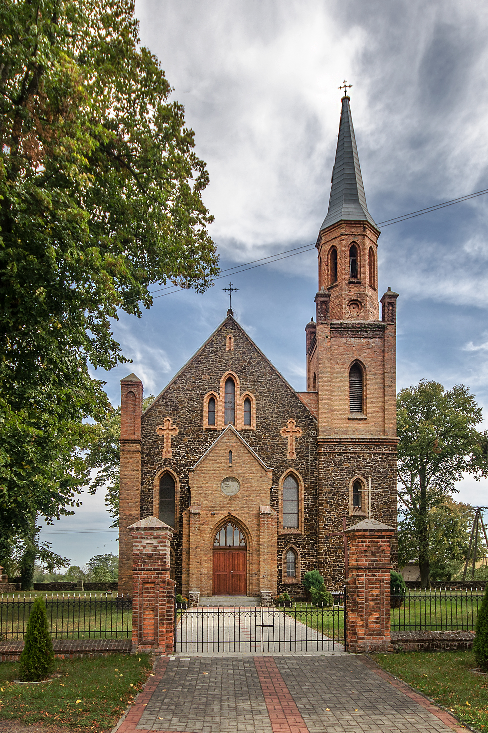 Kościół św. Józefa Robotnika w Wojsławicach, gm. Byczyna, pow. kluczborski, woj. opolskie